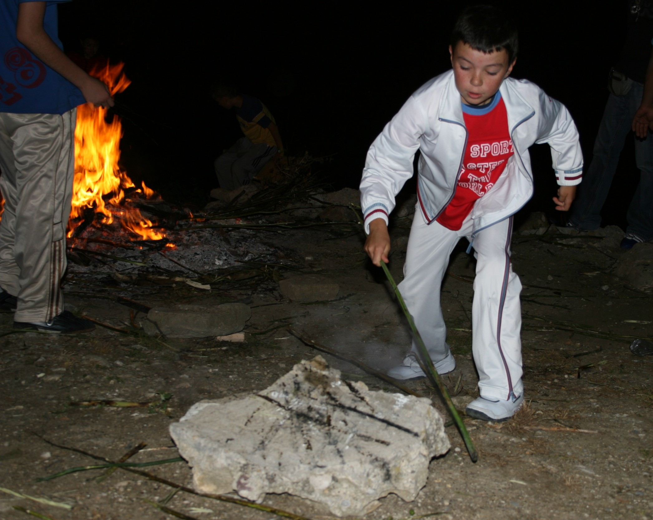 niño crujiendo gamones en una candela